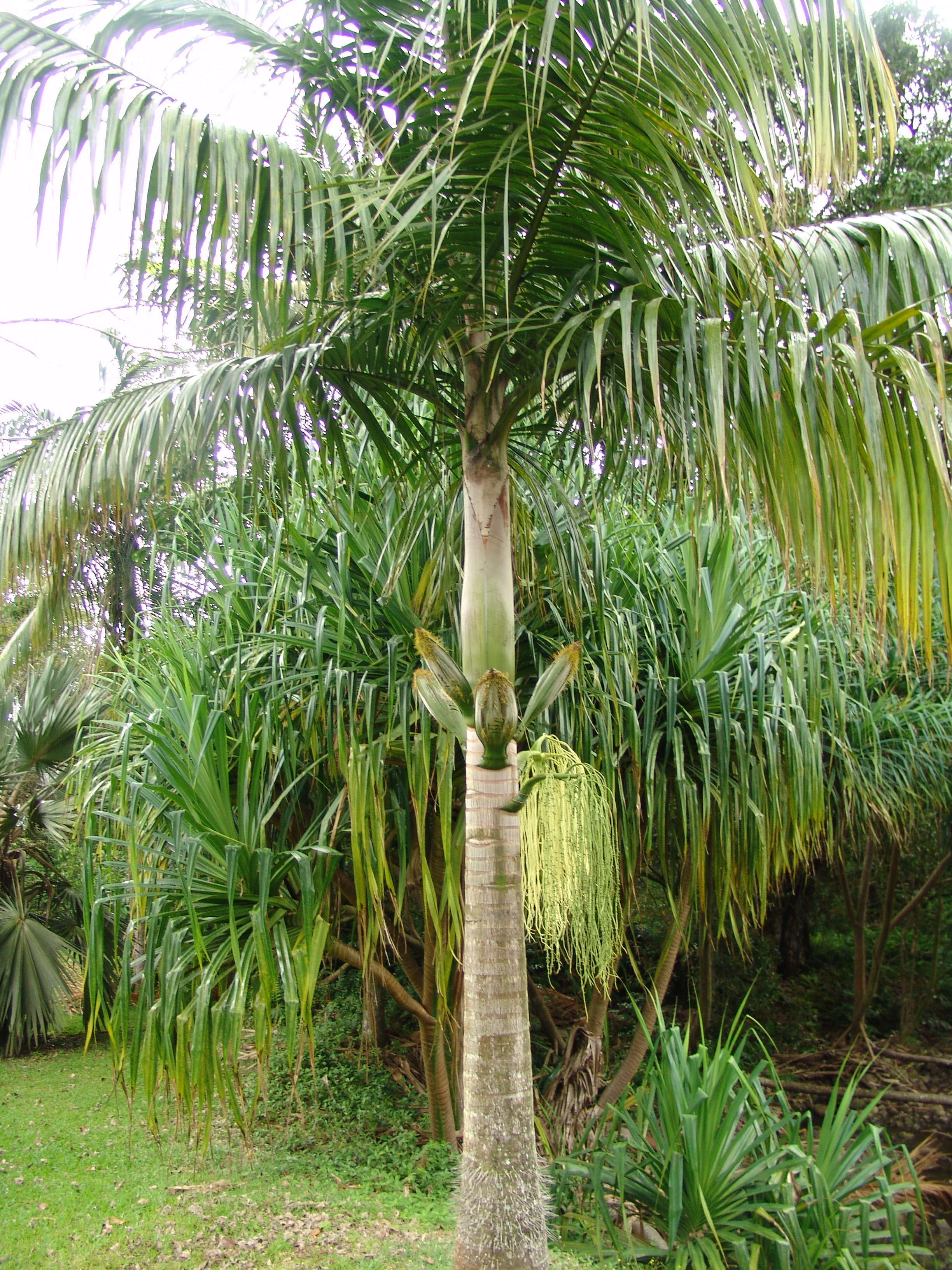 Ho'omaluhia Botanical Garden Oahu Hawaii